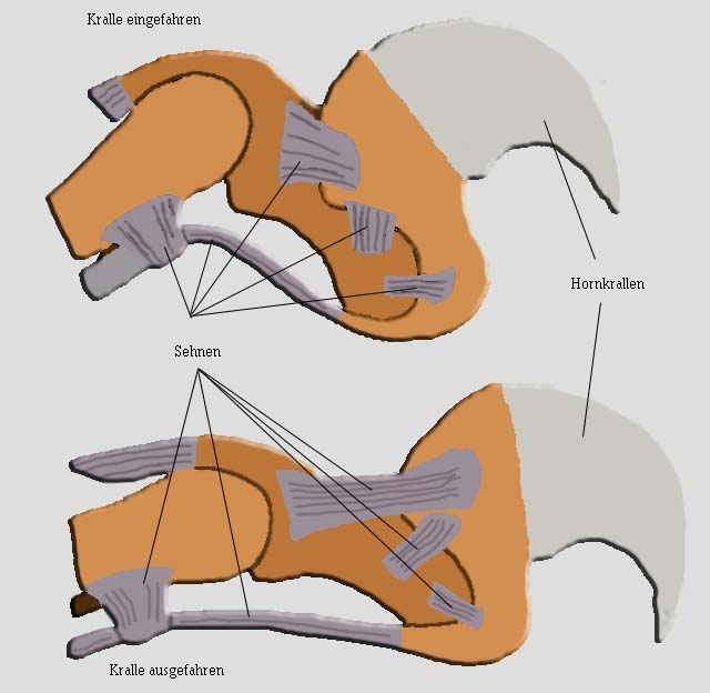 Schematische Abbildung der ein- und ausgefahrenen Krallen.